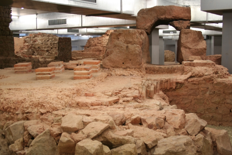 Ënnerierdesch Ruine vun de Véimaartthermen.